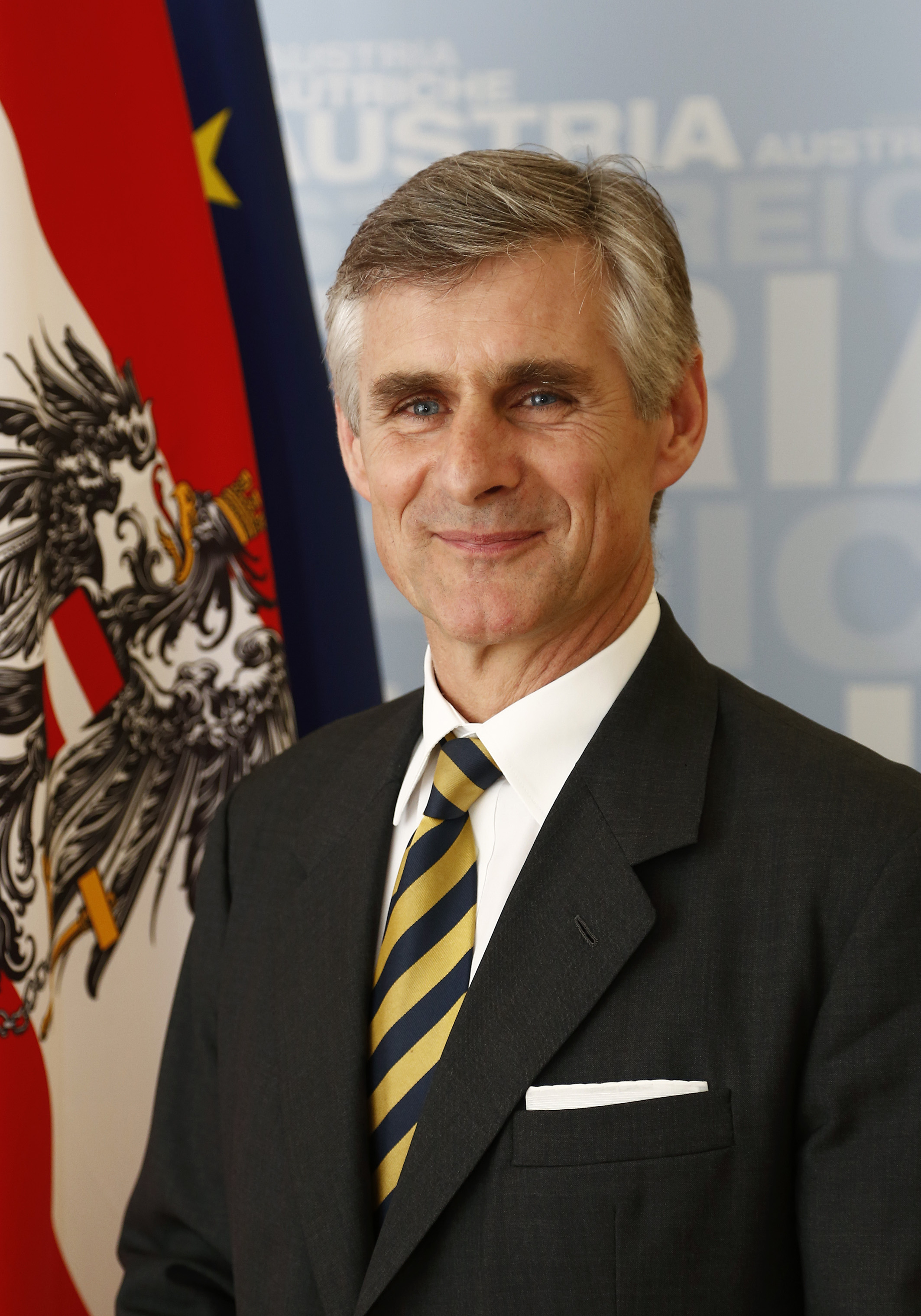 Der neue Generalsekretär im Außenministerium, Michael Linhart. Wien, 23.04.2013, Foto: Dragan Tatic